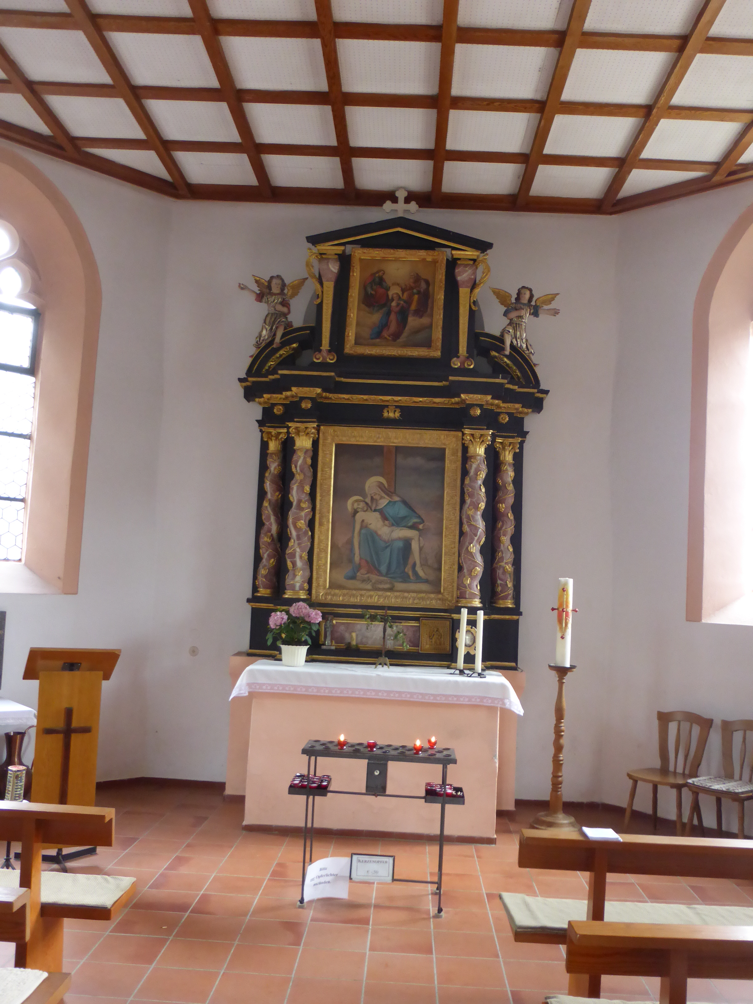 Friedhofkirche Mater Dolorosa (Eschenbach in der Oberpfalz) - Altarbild